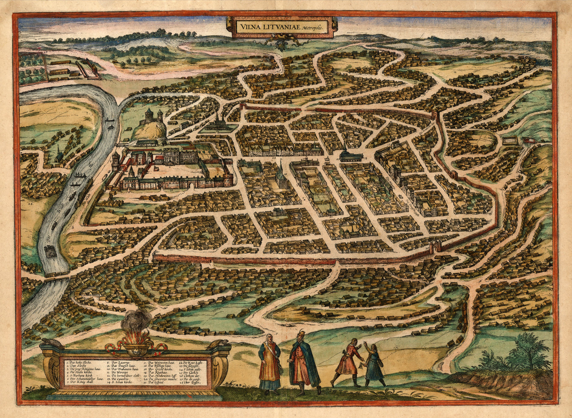 Беларуская (тарашкевіца): Вільня (Vilnia). Плян места (Vilna Lituaniae, Metropolis), з атлясу Гогенбэрга і Браўна.